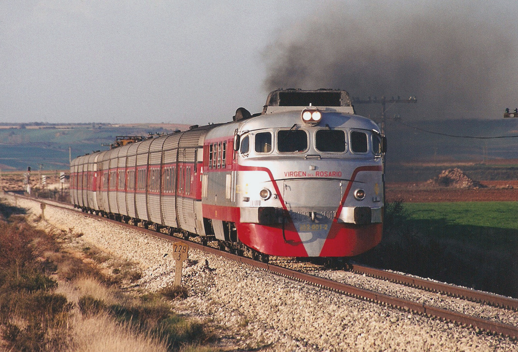 Talgo III Bilbao - Madrid con la locomotora "Virgen del Rosario" (serie 352, incialmente serie 2000T) en Lerma en el Ferrocarril de Madrid a Burgos por Aranda de Duero ("Directo de Burgos").